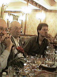 Schweizer: Damencoach Dragan Ilic, Viktor Kortschnoi und Herrencoach Jörg Grünenwald beim Abendessen, Schacholympiade 2000 in Istanbul.